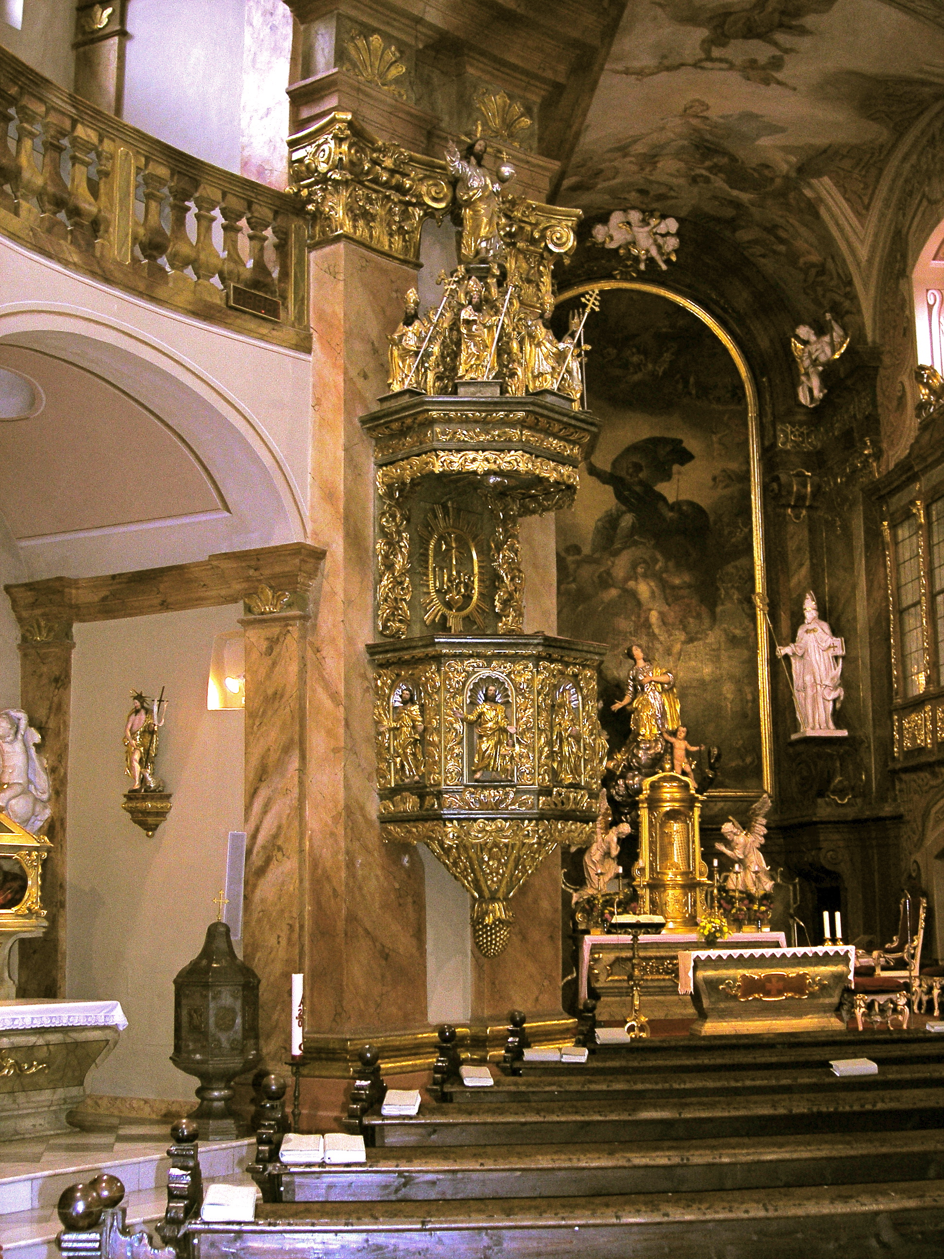 Kazatelna v bazilice Sv.Markéty v Jaroměřicích nad Rokytnou; autor Jan Joachim Litzendorf, 1689